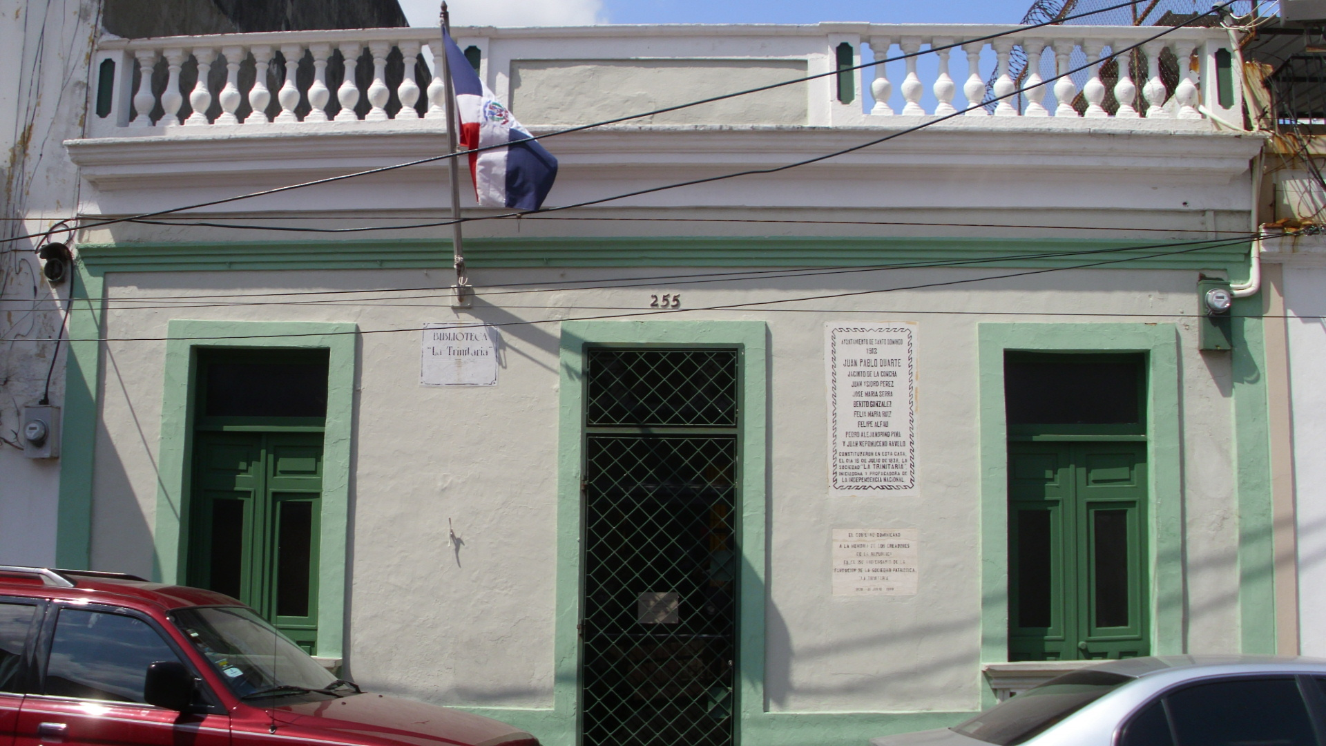 Huis waar de stichting van het Trinitaria plaatsvond